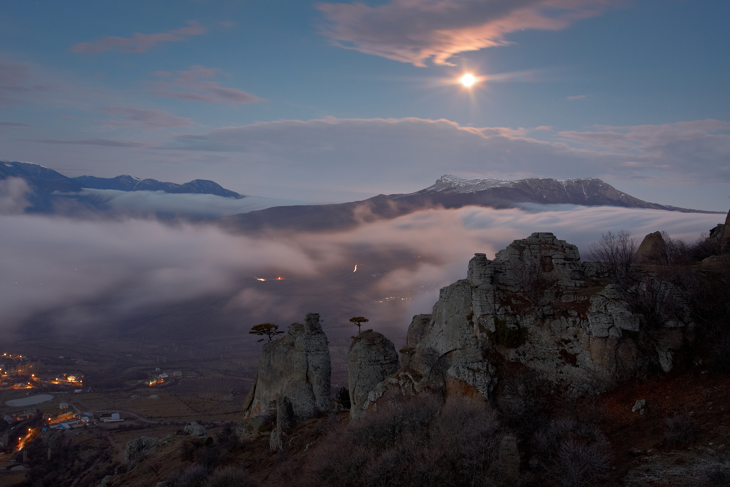 «Урочище Демерджі», м. Алушта, с. Лучисте, Алуштинське л-во, кв. 38